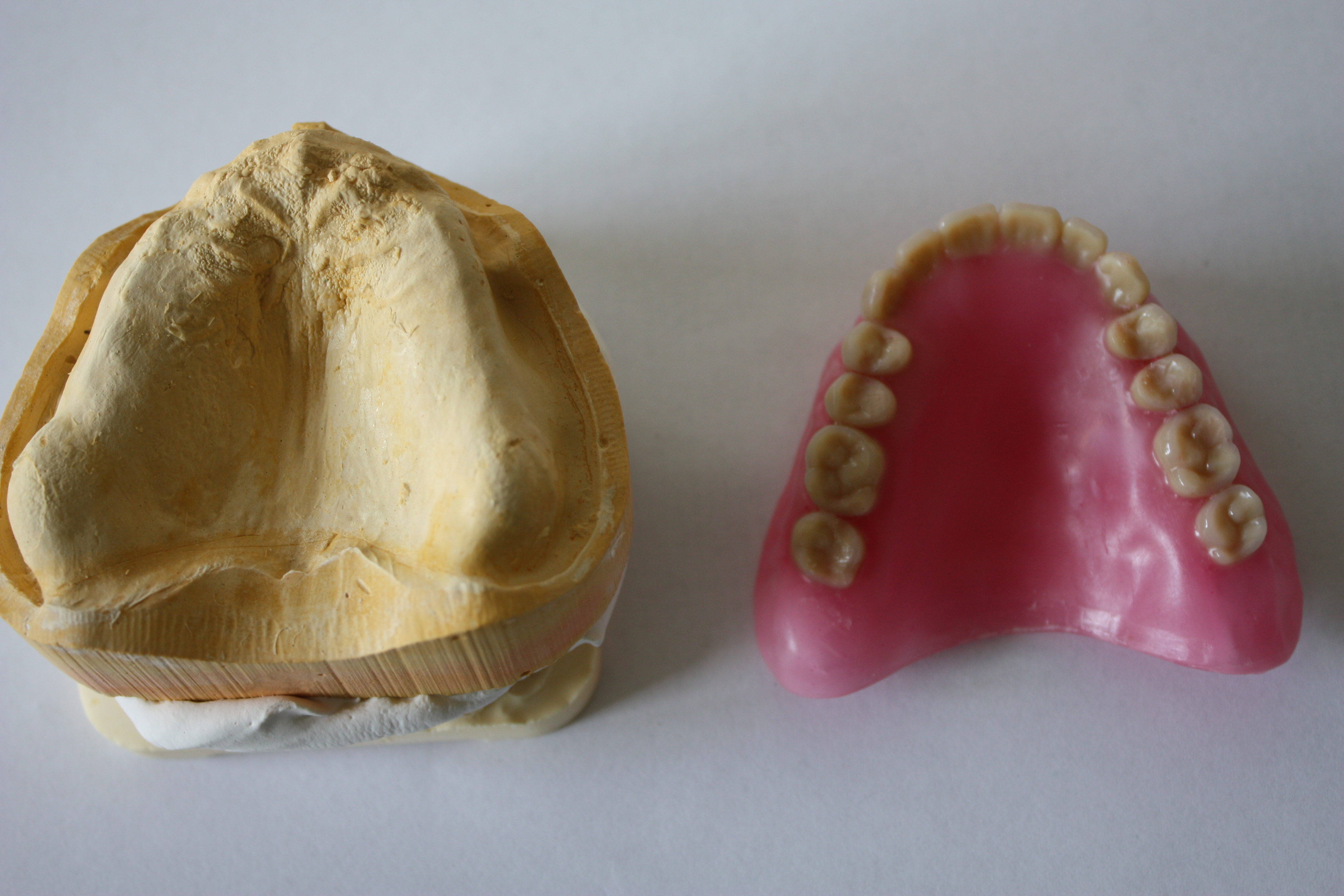 Complete denture, Oberkiefer Totalprothese in Wachs aufgestellt zur Einprobe, Kunststoffprothese,Wachsaufstellung